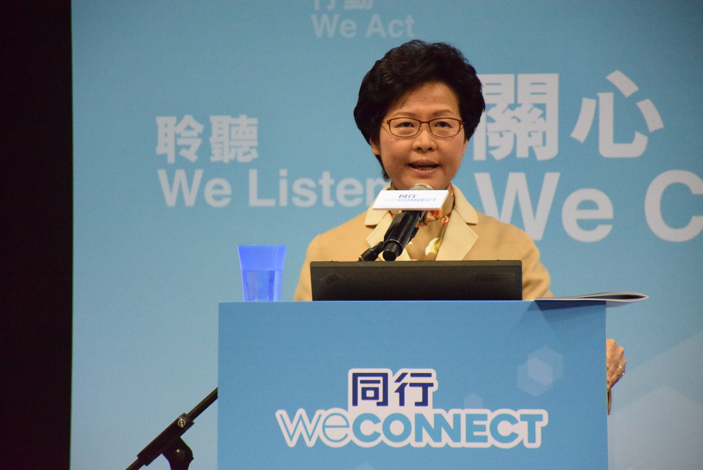 中文（香港）: 香港特首參選人林鄭月娥。（美國之音湯惠芸攝）